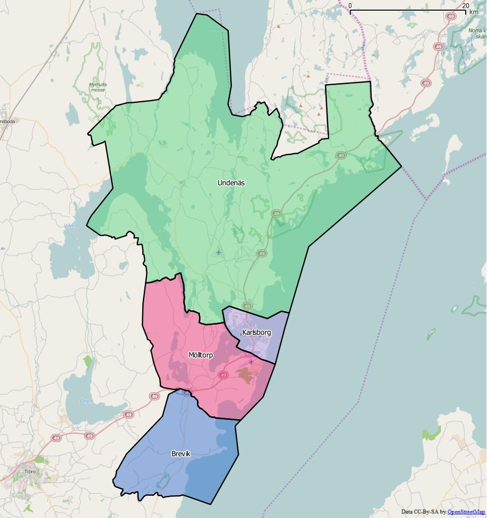 Distriktsindelningen i Karlsborgs kommun World file: 87.43982297023312356 0 0 -87.43982297023312356 1571486.71823605196550488 8138459.90411792788654566